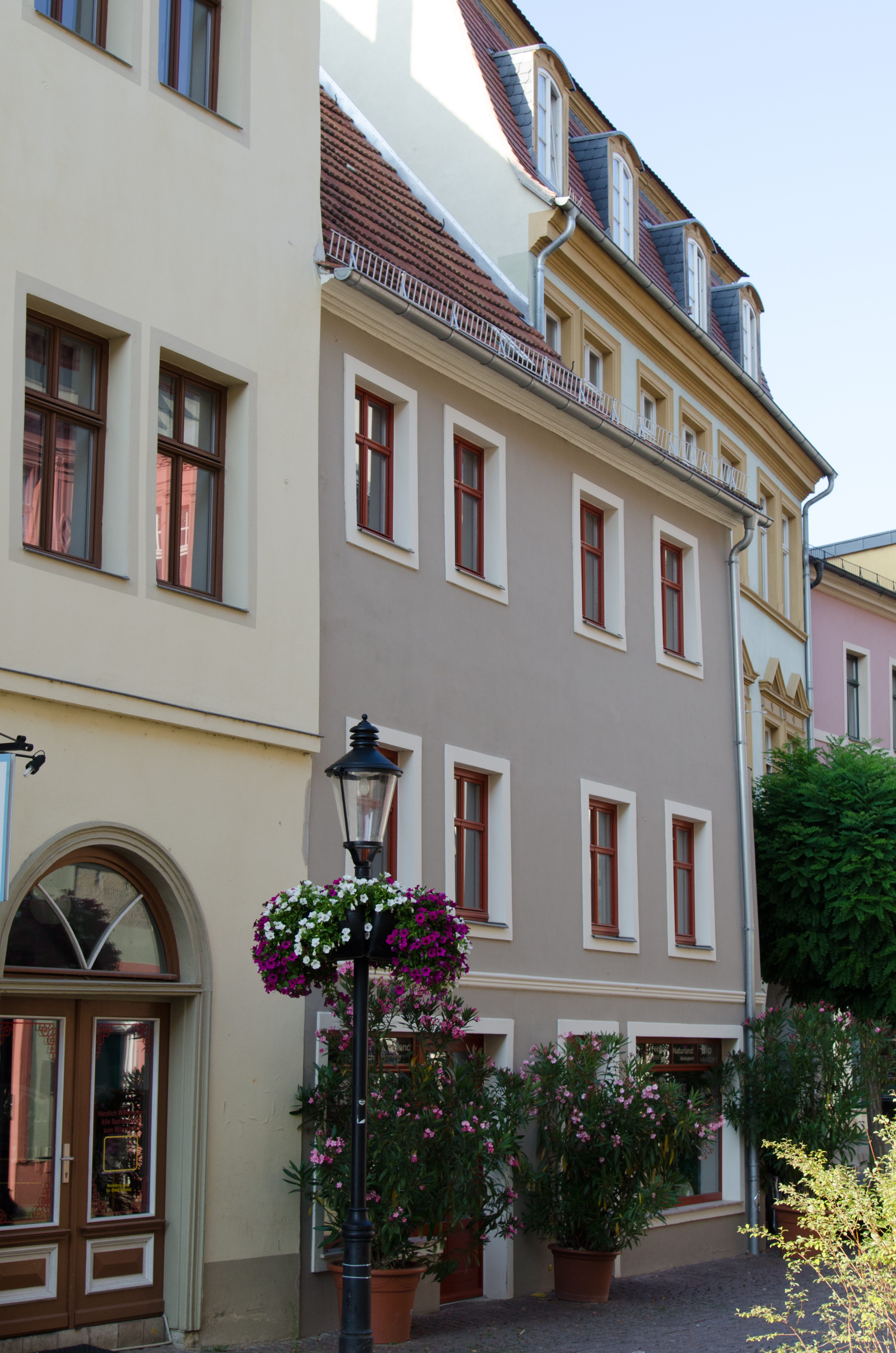 Naumburg, Salzstraße 11